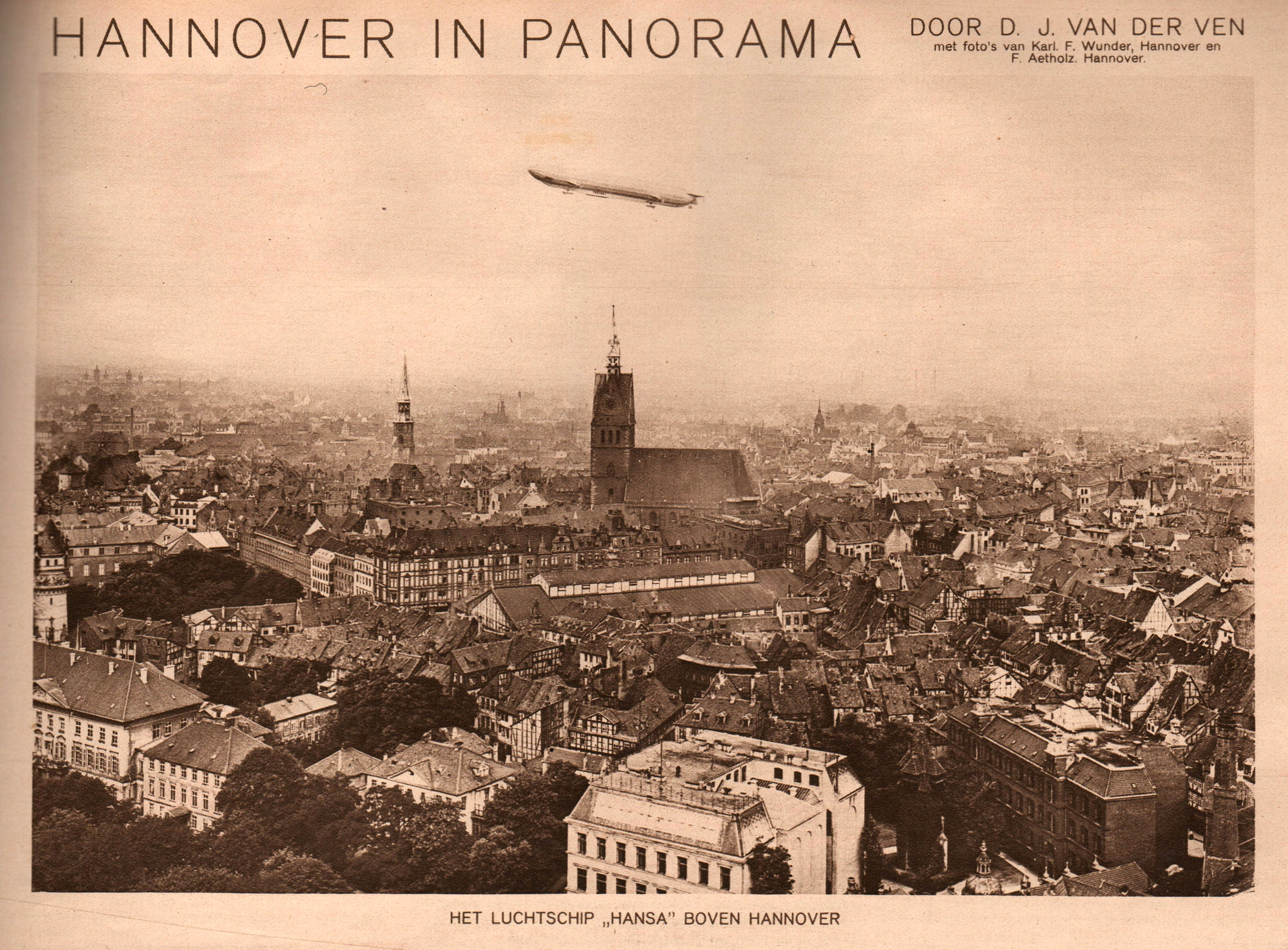 Punktgeraster Abdruck einer Fotografie von Karl F. Wunder oder Friedrich Astholz junior aus dem 1913 durch den Niederländer Dirk Jan van der Ven herausgegebenen Bildband „Hannover in Panorama“ hier das Luftschiff beziehungsweise der Zeppelin LZ 13 Hansa ...